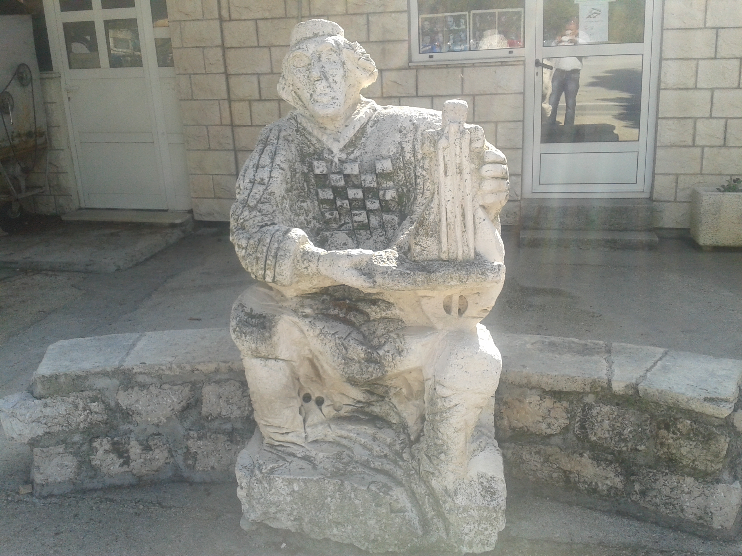 Spomenik lijeričaru u Stonu